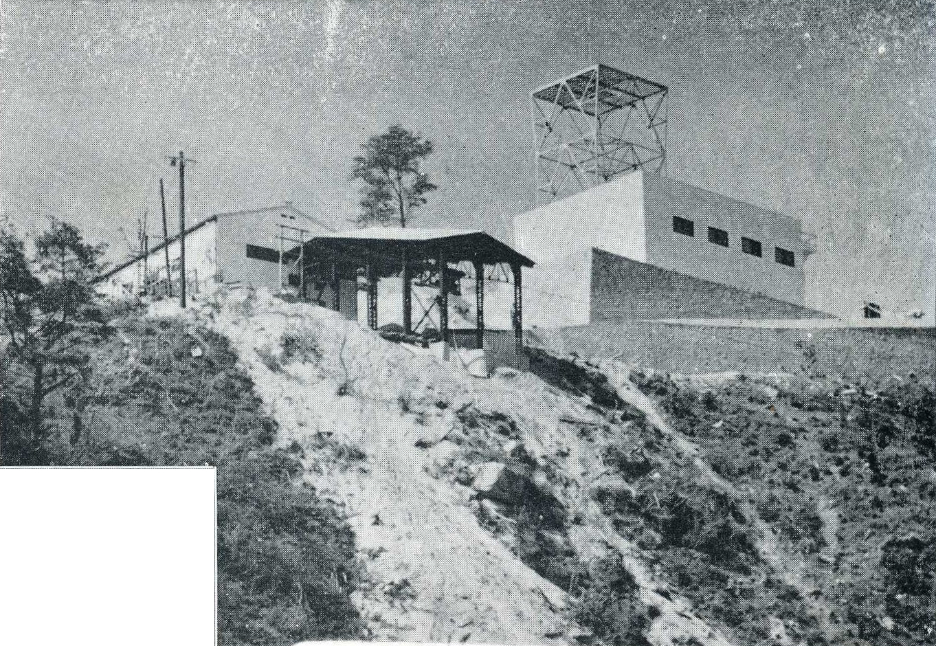 広島市の己斐無線中継所